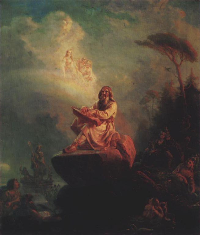 Väinämöisen soitto